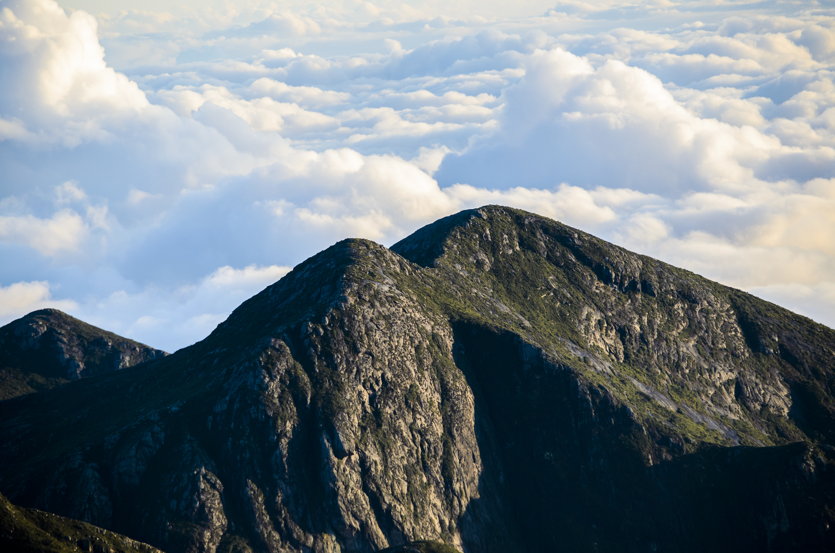 Insira_uma_descrição_para_sua_foto